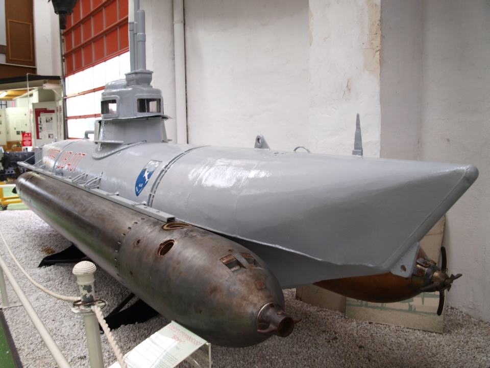 Muzeum Speyer